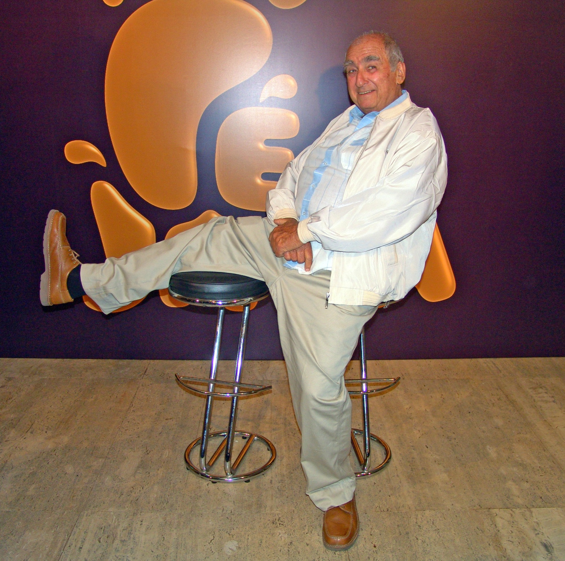 Elias Gleizer em 2006.